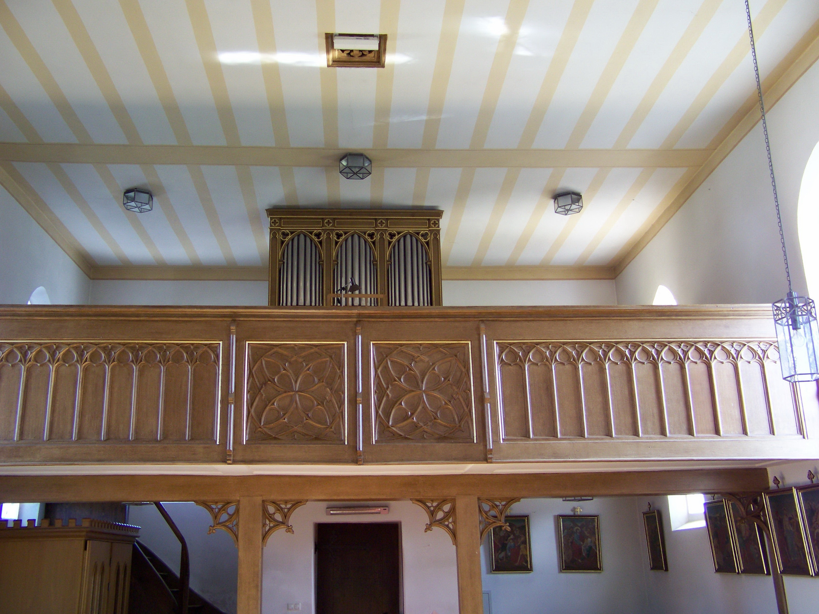 Laberweinting, Franken 13, katholische Expositurkirche St. Nikolaus. Orgelempore. Emporenbrüstung mit Maßwerk in Feldern. Eingang durch das Untergeschoss des südlich einspringenden Turmes.